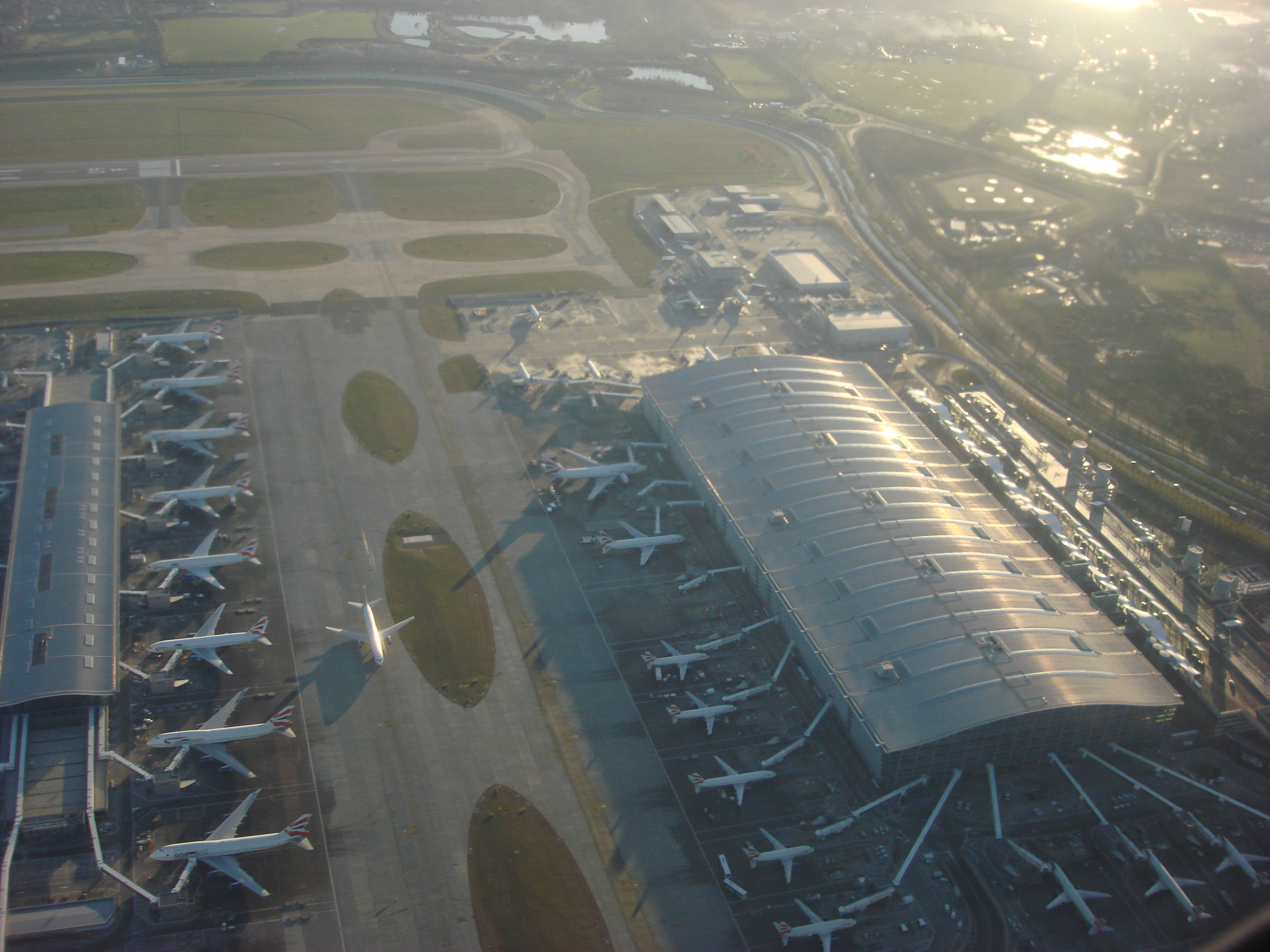 Own work